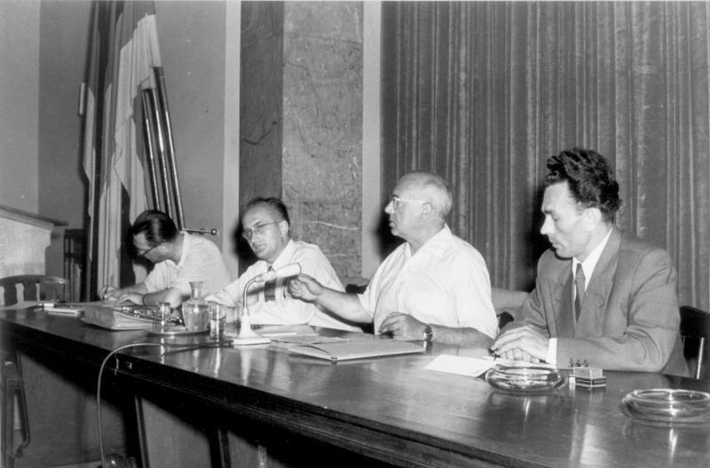 Berlin, Pressekonferenz Zentralbild/Quasch. 20.7.1955 Pressekonferenz mit Minister Dr. Joh. R. Becher Am 20.7.1955 berichtete der Minister für Kultur Dr. h.c. Joh. R. Becher auf einer Pressekonferenz im Steinsaal des Presseamtes beim Ministerpräsidenten von seinem gesamtdeutschen Kulturgespräch in München. U.B.z. Minister Joh. R. Becher bei seinem Bericht. Rechts: der Leiter des Aufbauverlages Janka; (2.v.links) der persönliche Referent des Ministers Karl Tümmler und aussen links der Pressestenograf Maas. 31 817/2N Abgebildete Personen: Becher, Johannes R.: Kulturminister, Dichter, Schriftsteller, DDR (GND 118507931) Janka, Walter: Schriftsteller, DDR (GND 118881205)